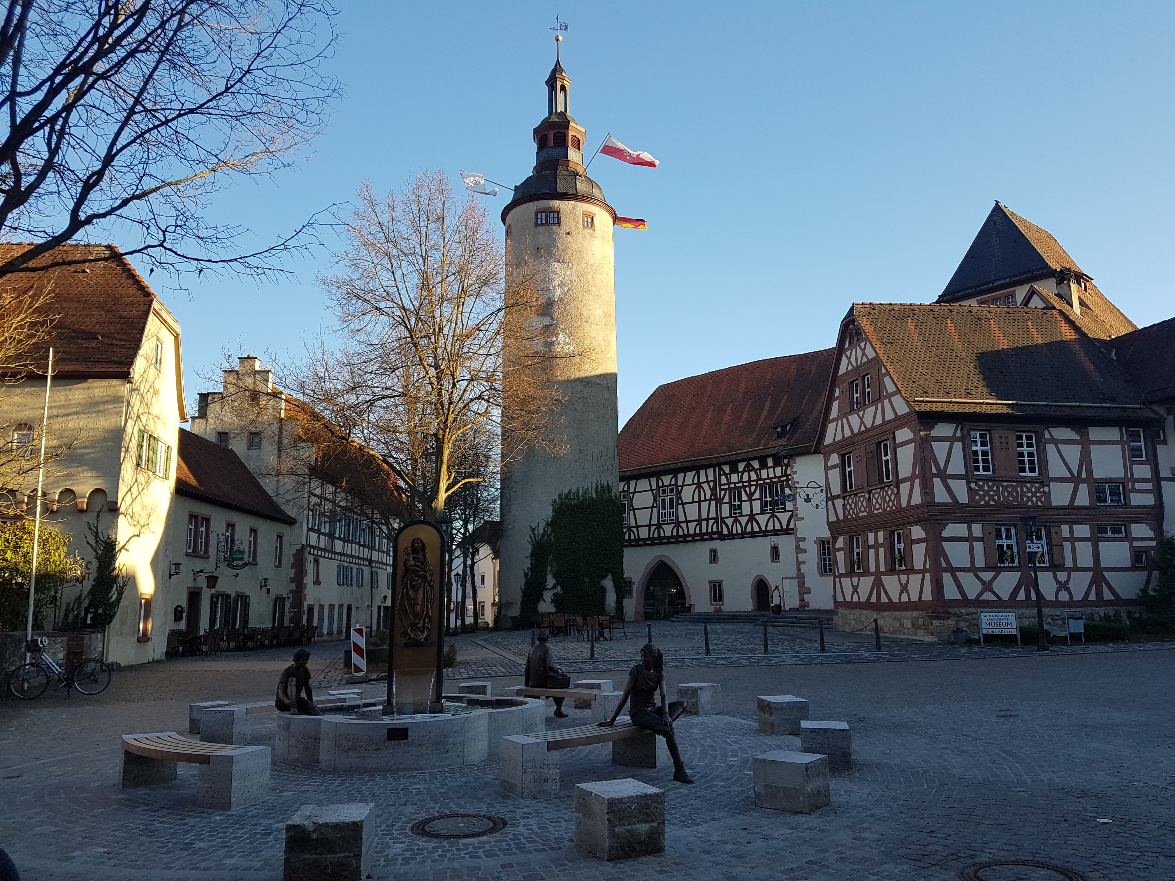 Kurmainzisches Schloss Tauberbischofsheim mit Türmersturm und Tauberfränkischem Landschaftsmuseum Blick auf Schloss und Turm, im Vordergrund ein bereits 2016 neu gestalteter Brunnen